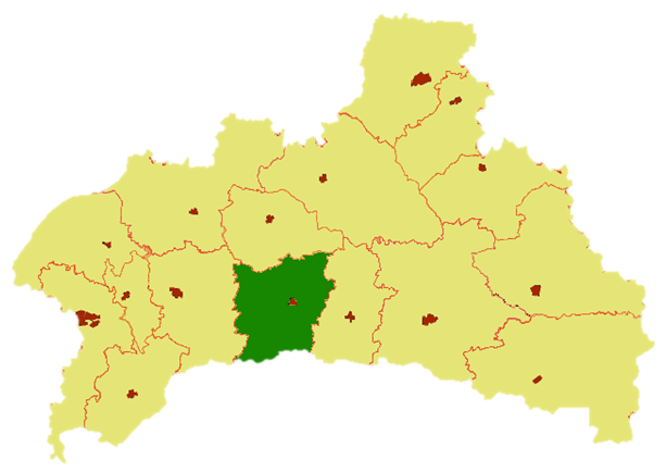 Drahičynský rajón v rámci Brestské oblasti